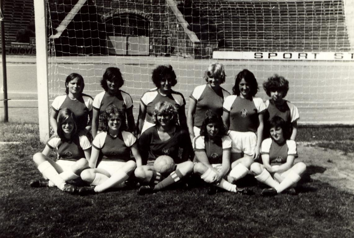 Die BSG Post Rostock im Juni 1975 im Rostocker Ostseestadion/ Die Spielerinnen - Reihe oben von links nach rechts: Renate Draheim, Andrea Unkhoff, Renate Wenzel, Christiane Mühlenbruch, Monika Krohn, Sigrun Patermann; Reihe unten von links nach rechts: Heike Wittfoth, Edith Junge, Hildtraut Groppe (Tor), Margot Kröger, Angelika Hünemörder